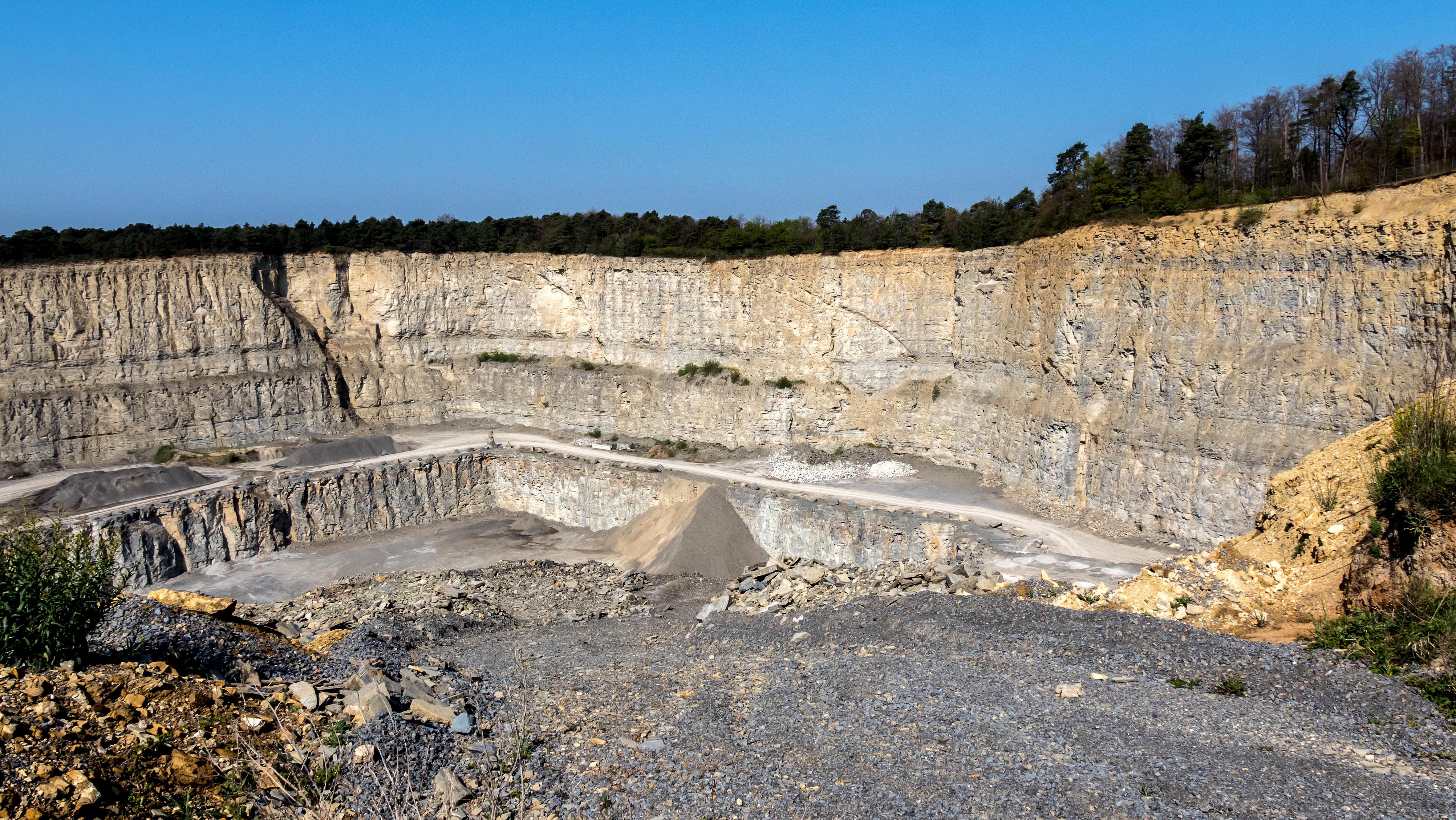 Geotope im Landkreis Würzburg Steinbruch an der Straße Thüngersheim-Güntersleben Geotop-Nummer: 679A010 Nordseite 9